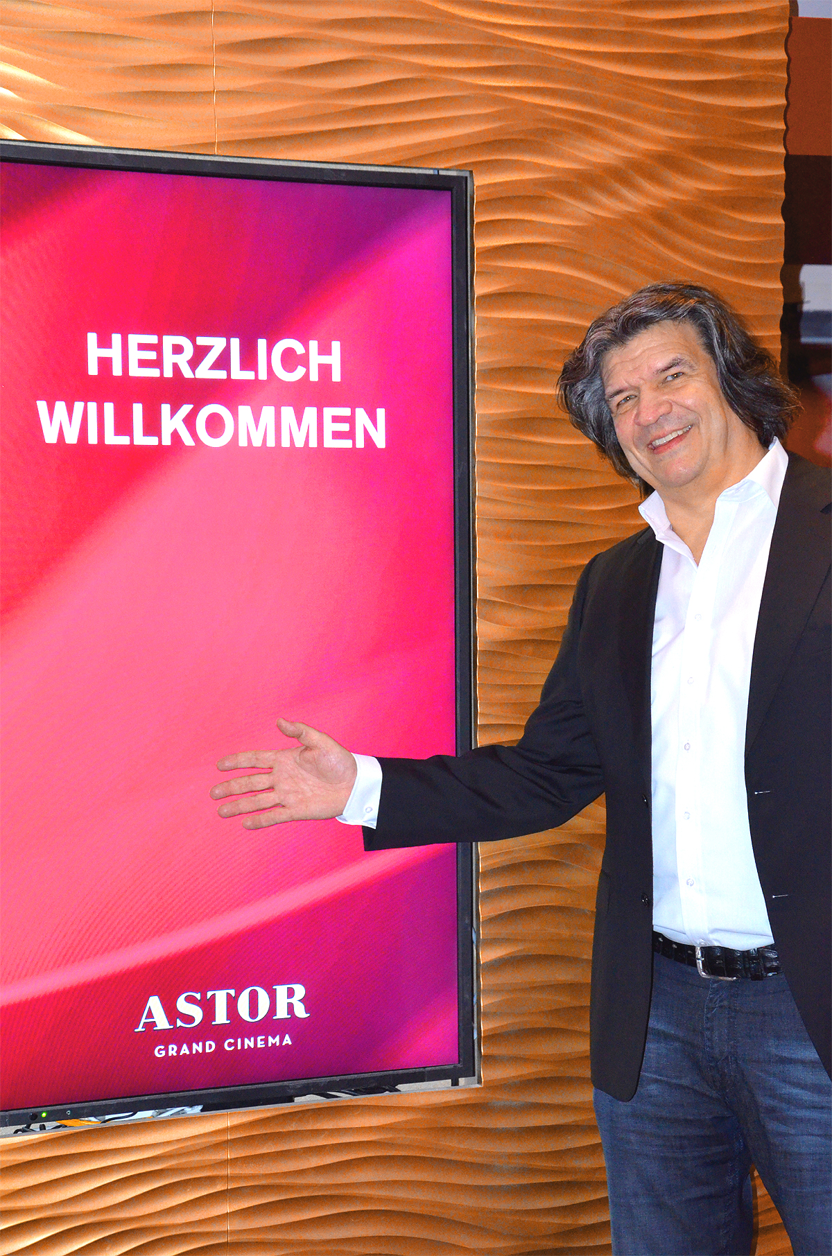 Kurz vor dem Eintreffen der VIPs zur offiziellen Eröffnung des Premium-Kinos Astor Grand Cinema in Hannover fand Geschäftsführer Heinz Lochmann noch die Zeit für ein kleines Foto-Shooting und ein "Herzlich Willkommen" ...